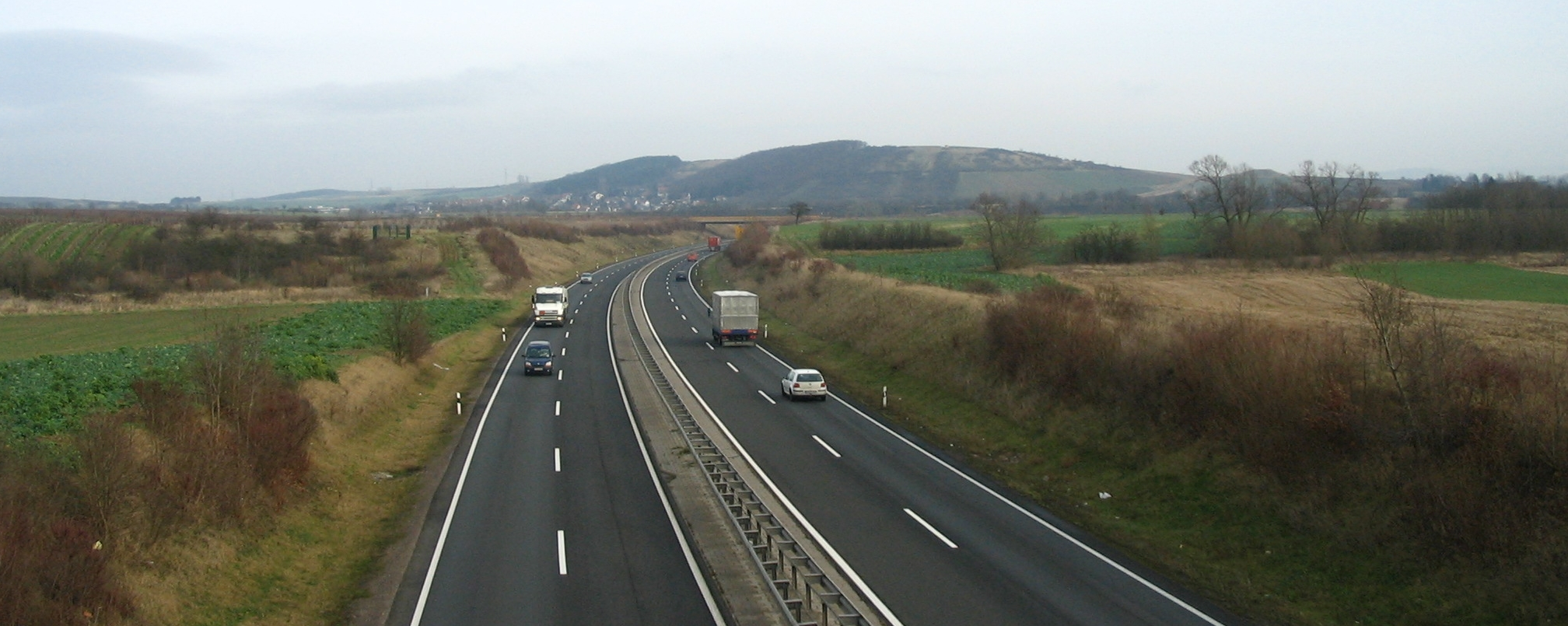 Bundesstraße B 41 zwischen Bad Kreuznach und Rüdesheim